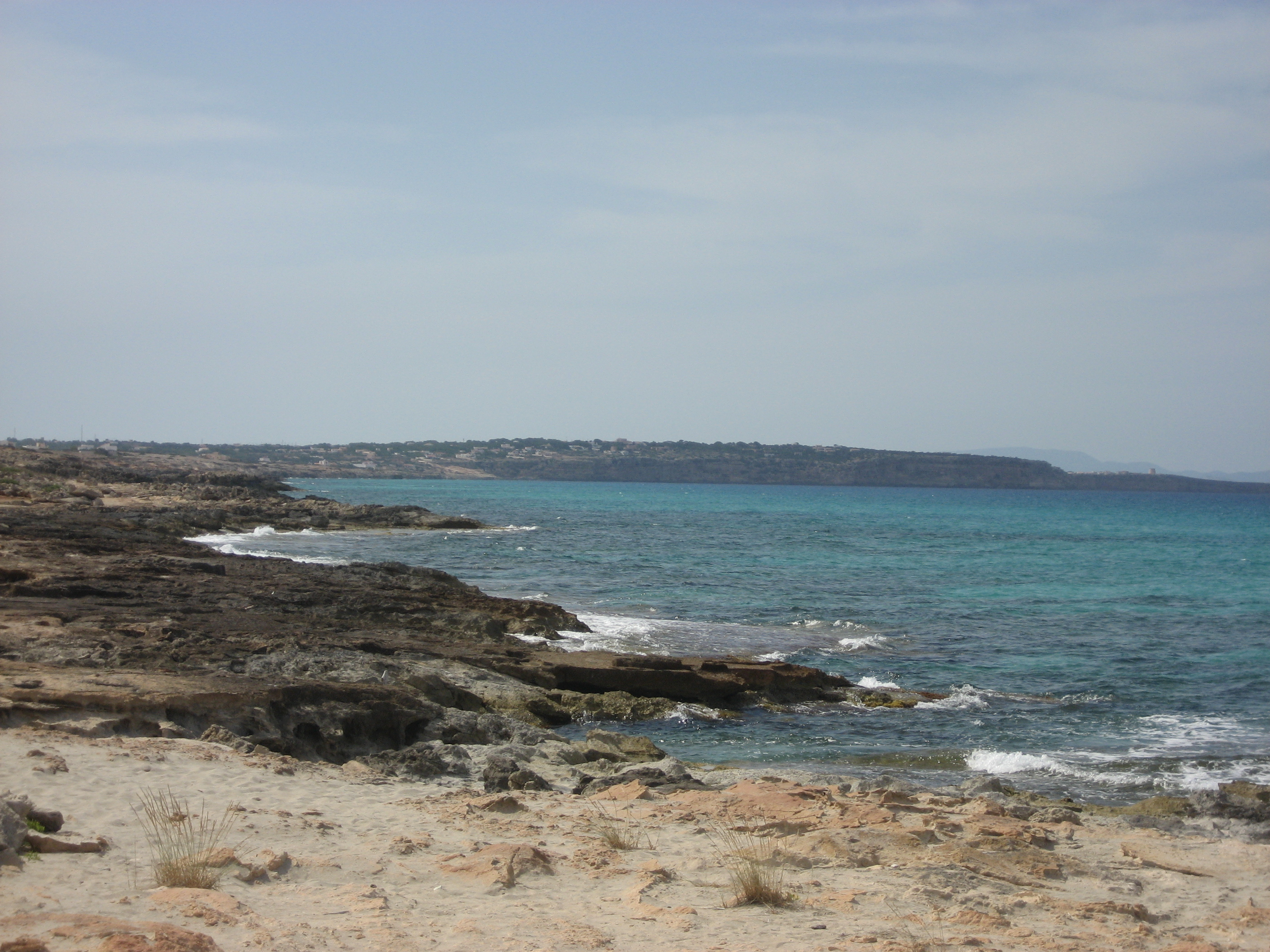 Ses Platgetes (Formentera) This is a a photo of a beach in the Balearic Islands, Spain, with id: PL-IB-86009